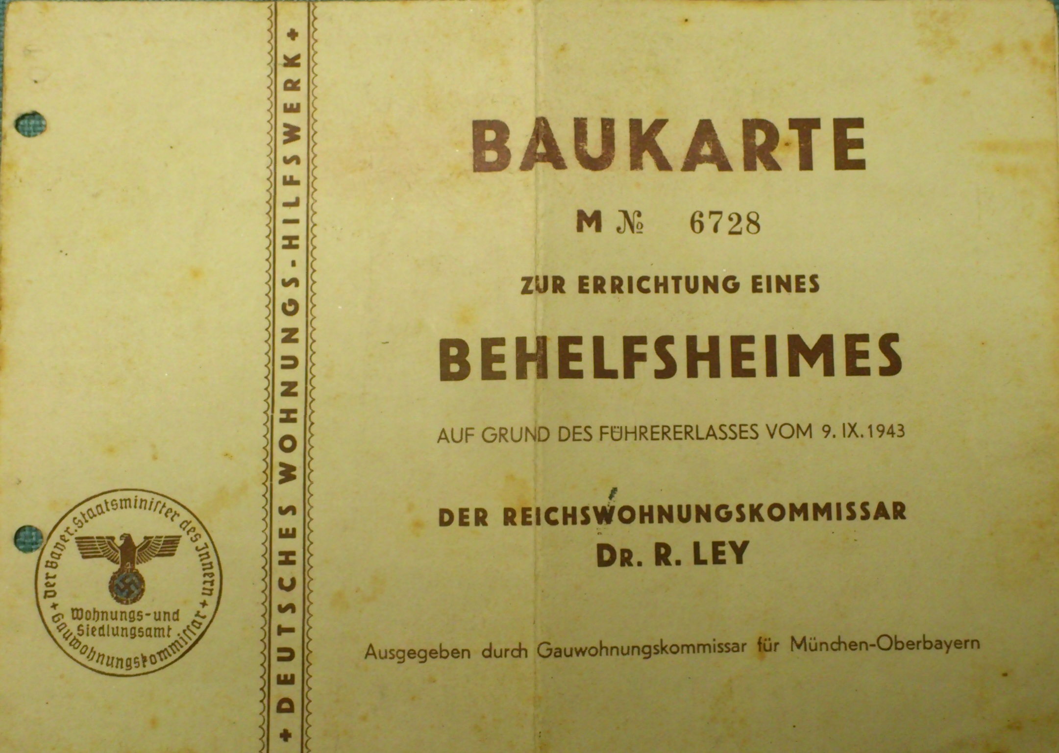 Deutsches Wohnungshilfswerk Baukarte